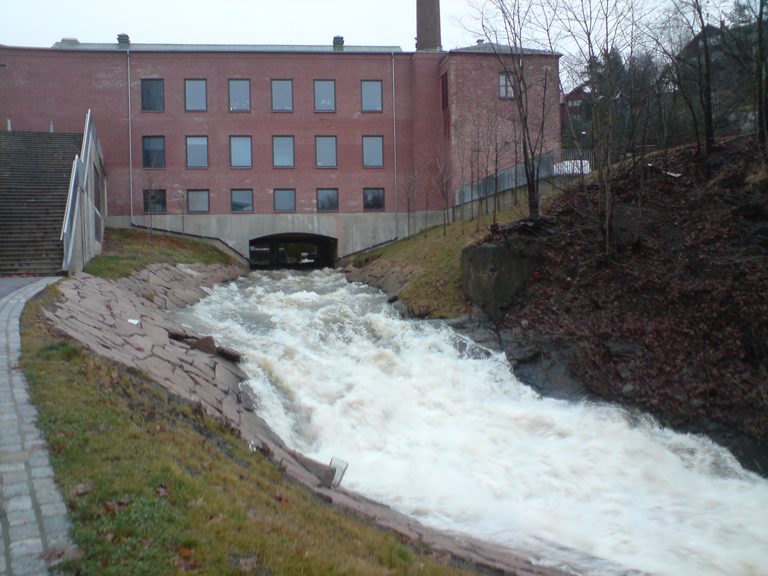 Alna passing Bryn in Oslo